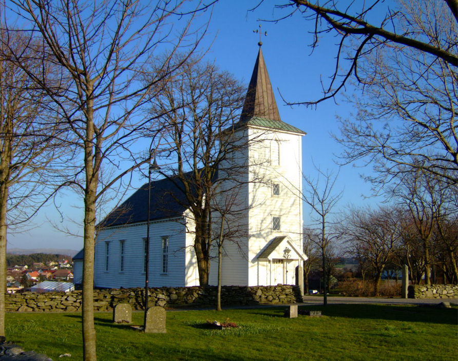 Klepp church, Kleppe Norway